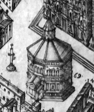 Pianta del buonsignori, dettaglio 069 san giovanni (battistero)